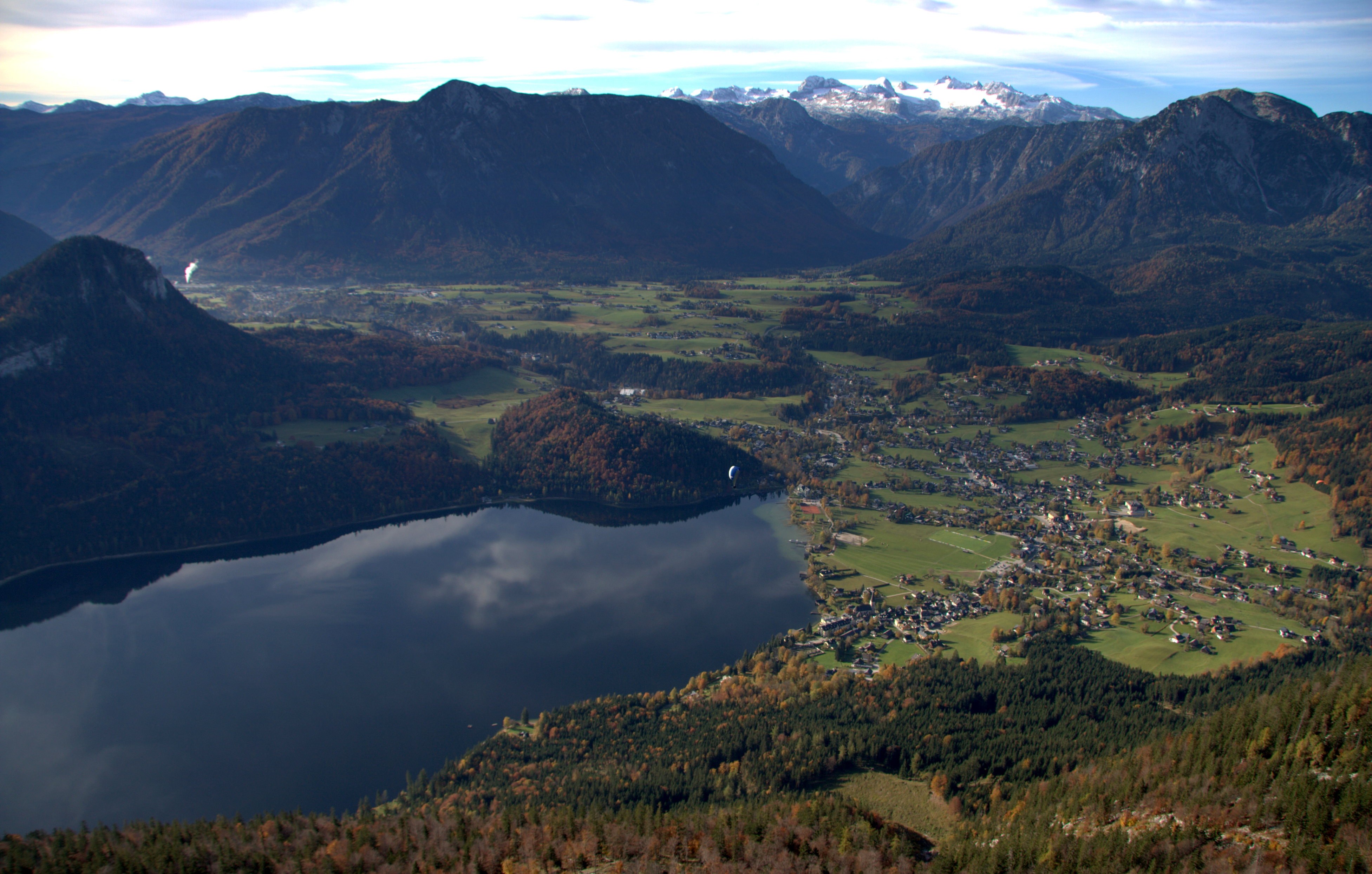 Altaussee, October.jpg